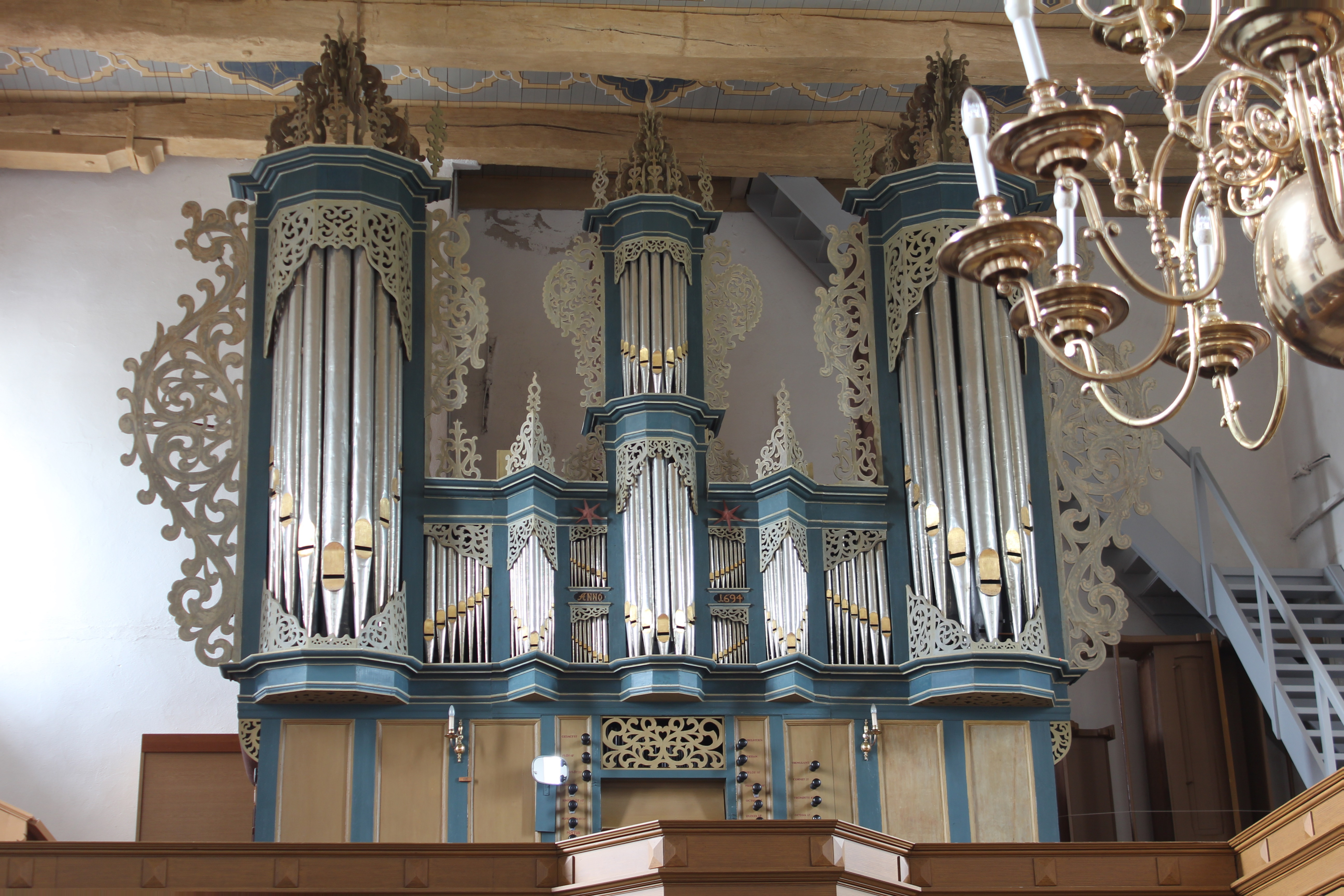 Blick aus dem Kirchenschiff der Kirche St. Sixtus und Sinicius zu Wangerland-Hohenkirchen zur Kayser-Orgel